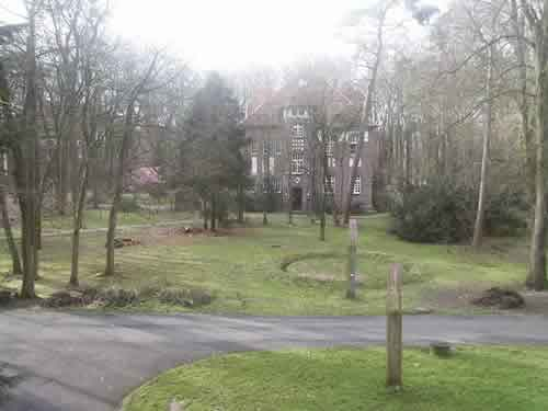 Artoll Labor, Bedburg-Hau: uitzicht vanaf de eerste verdieping